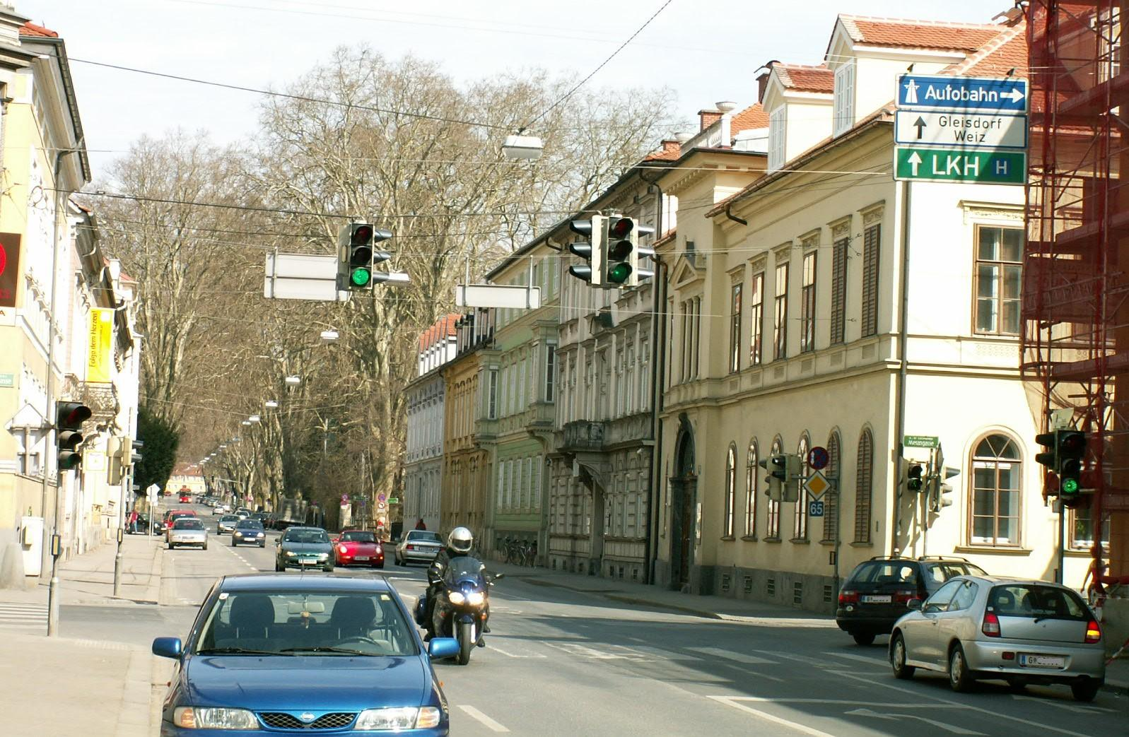 B 65 (Elisabethstraße) im Stadtgebiet von Graz (die Merangasse kreuzt von links nach rechts)